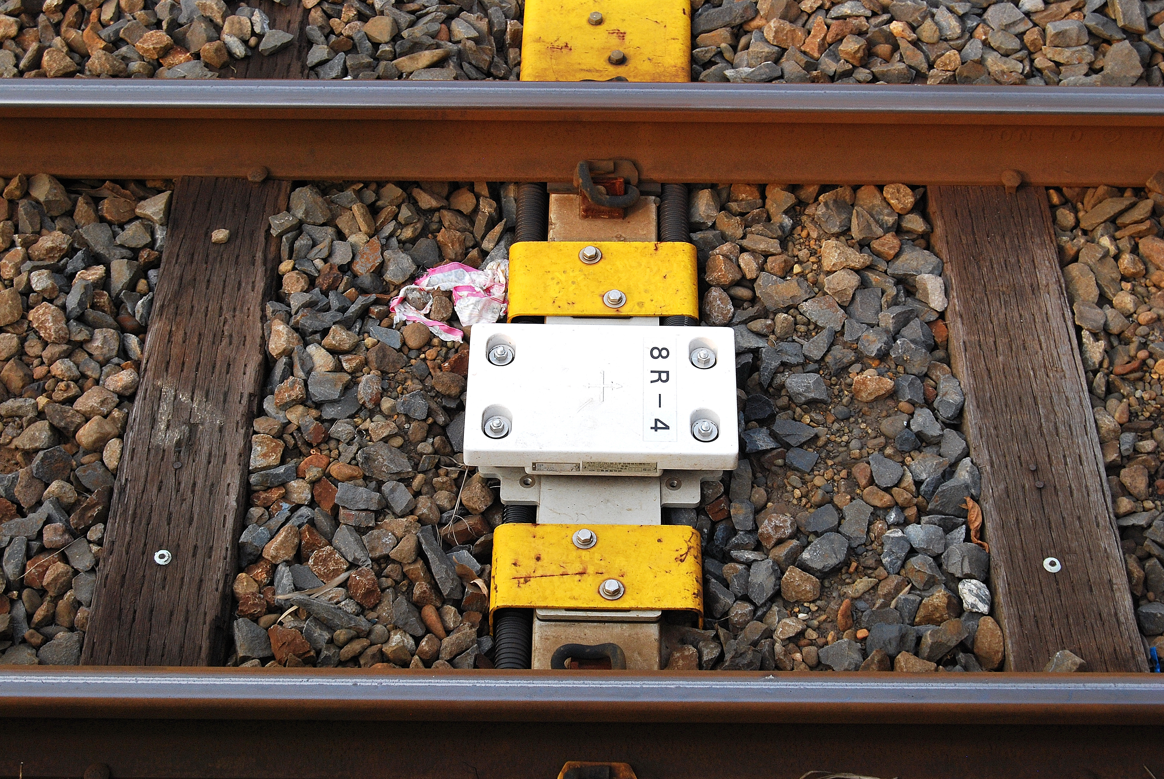 ATS-PN（無電源地上子方式ATS-P）の地上子（ホームから撮影）